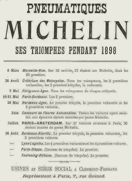 Les succès sportifs Michelin en 1898 - L'Almanach des Sports 1899 sous la direction de Maurice Leudet , librairie Paul Ollendorff, p.106